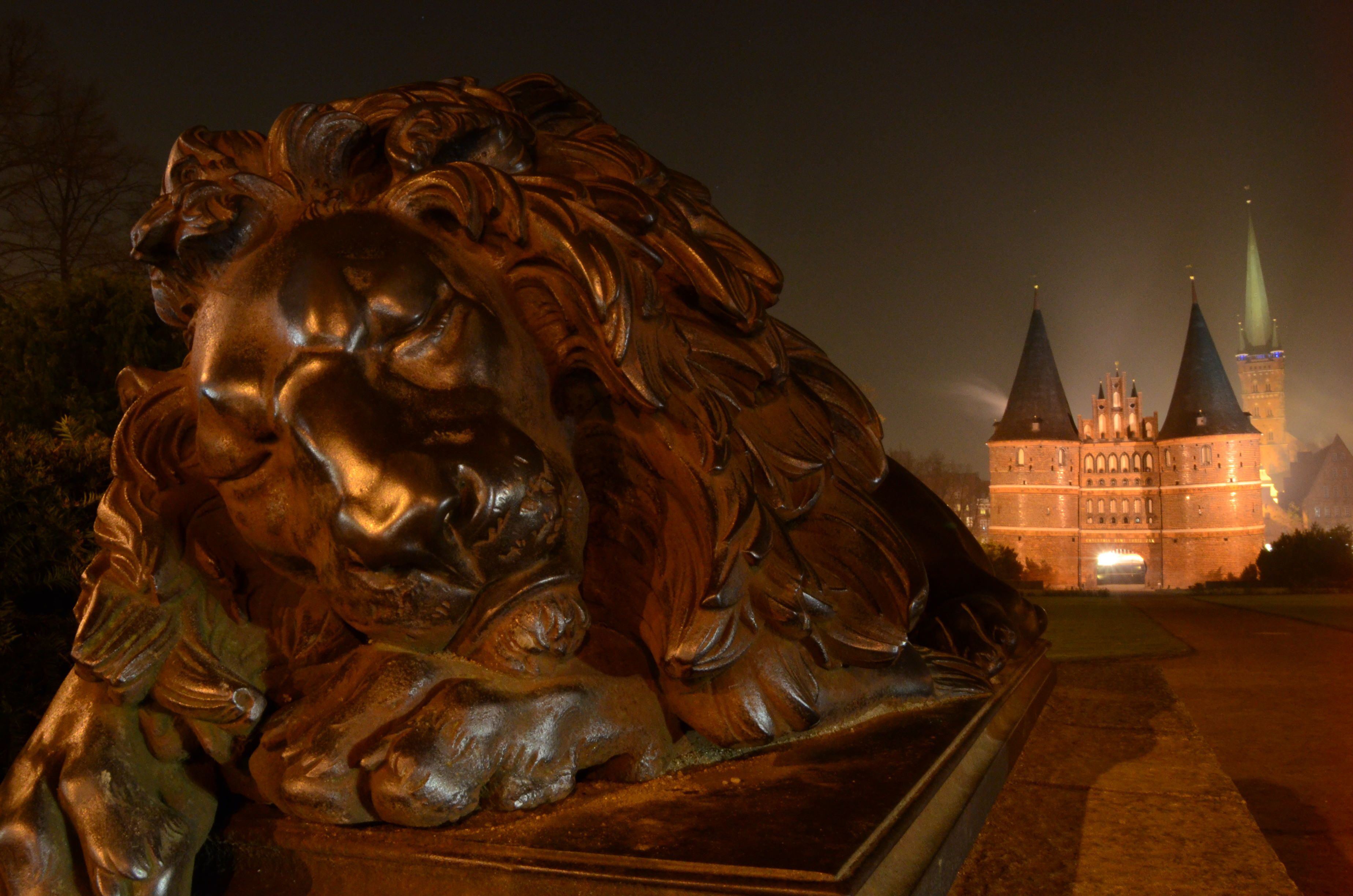 Holstentor (Lübeck) mit Löwenstatue im Vordergrund